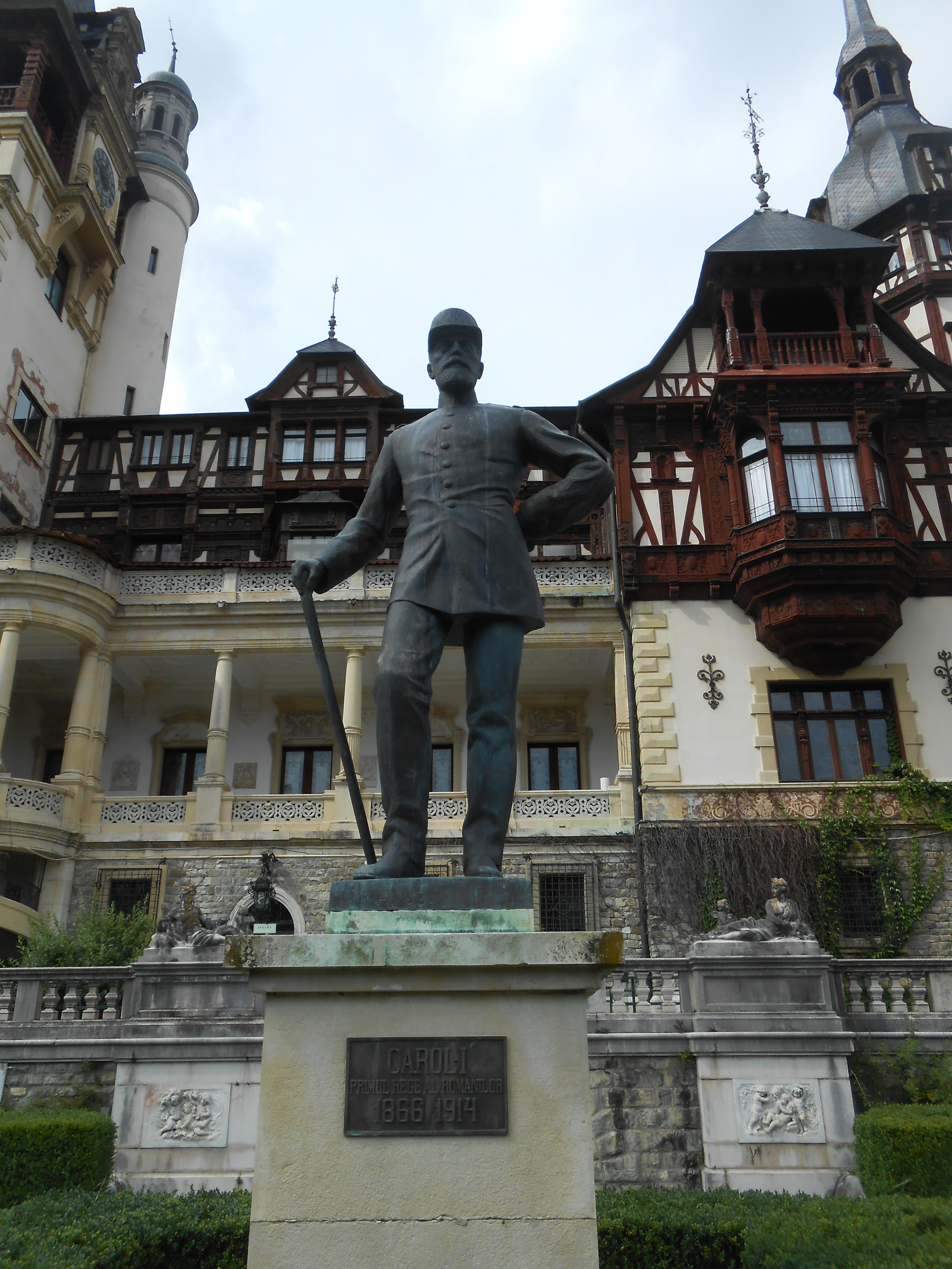 Monumento a Carol I re di Romania, Castello di Peleș, Sinaia, Romania